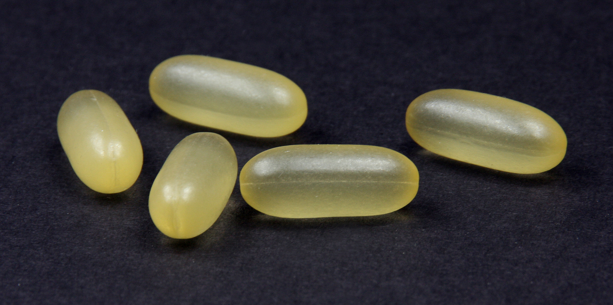 Weichgelatinekapseln mit Myrtol (Gelomytol)